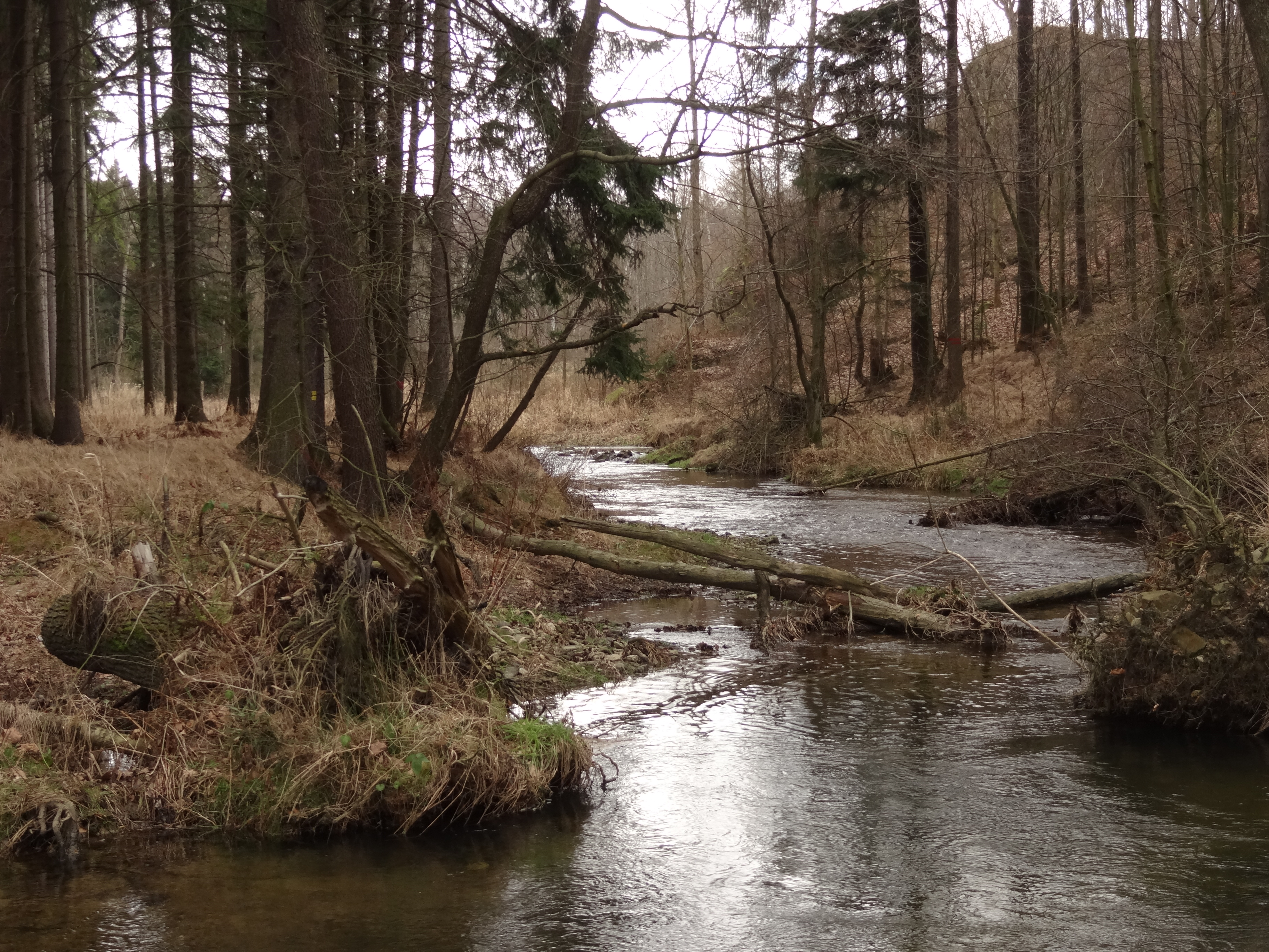 PP Hadí kopec leží na území přírodního parku Peklo mezi Krásným Lesem a Raspenavou v okrese Liberec. Předmětem ochrany je geomorfologicky výrazný masiv čedičového tělesa rozděleného tokem Lomnice s ukázkami sloupcové odlučnosti a fragmenty lesního porostu charakteru submontánního listnatého háje s lokálně vzácnými teplomilnými bylinnými prvky.